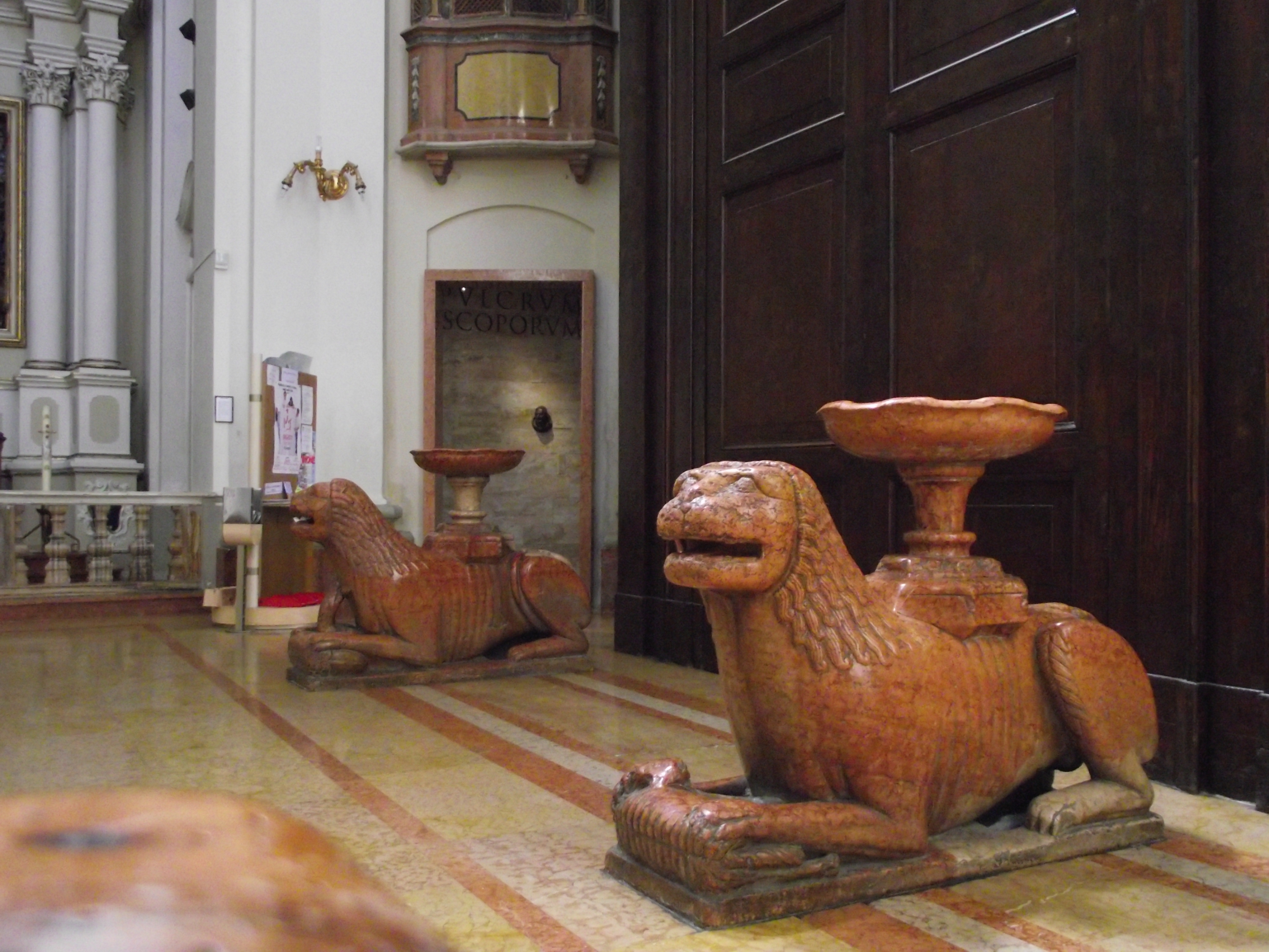 le Acquasantiere, leoni stilofori di Giorgio da Como, XIII secolo